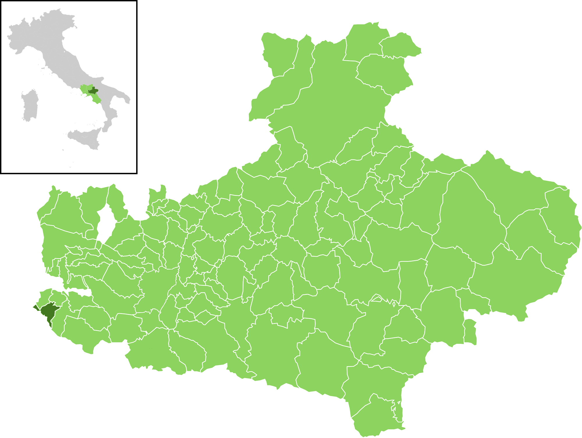 Il comune all'interno della provincia di Avellino